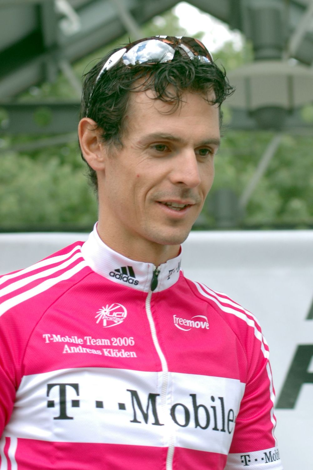 Beschreibung: Andreas Klöden (Team T-Mobile, Gesamtsieger der Rothaus Regio-Tour International 2006) beim Auftakt der Rothaus Regio-Tour in Heitersheim Quelle: selbst fotografiert Datum: 16. August 2006 Ort: Heitersheim, Baden-Württemberg, Deutschland Fotograf oder Zeichner: Alex Alex (de) Kamera: Nikon D 70 Software: The GIMP Andere Versionen: Lizenzstatus: GNU FDL